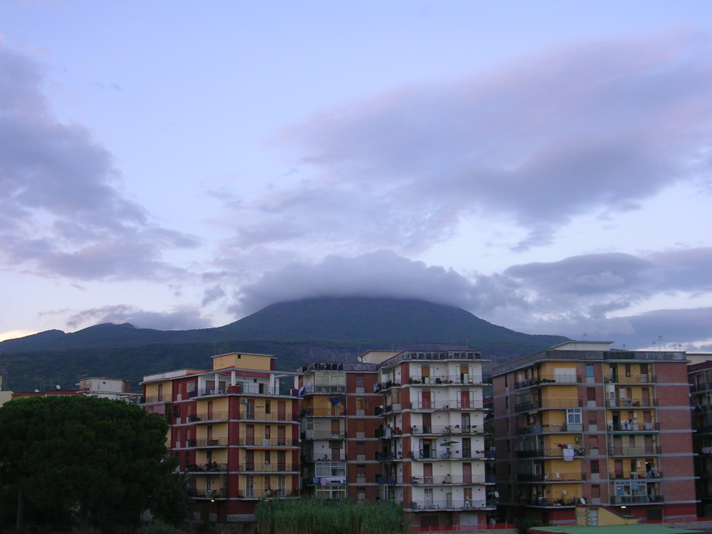 Torre del Greco, Campania, Italia